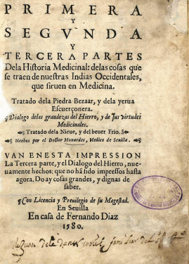 Nicolas Monardes, Historia medicinal, 1580, tp